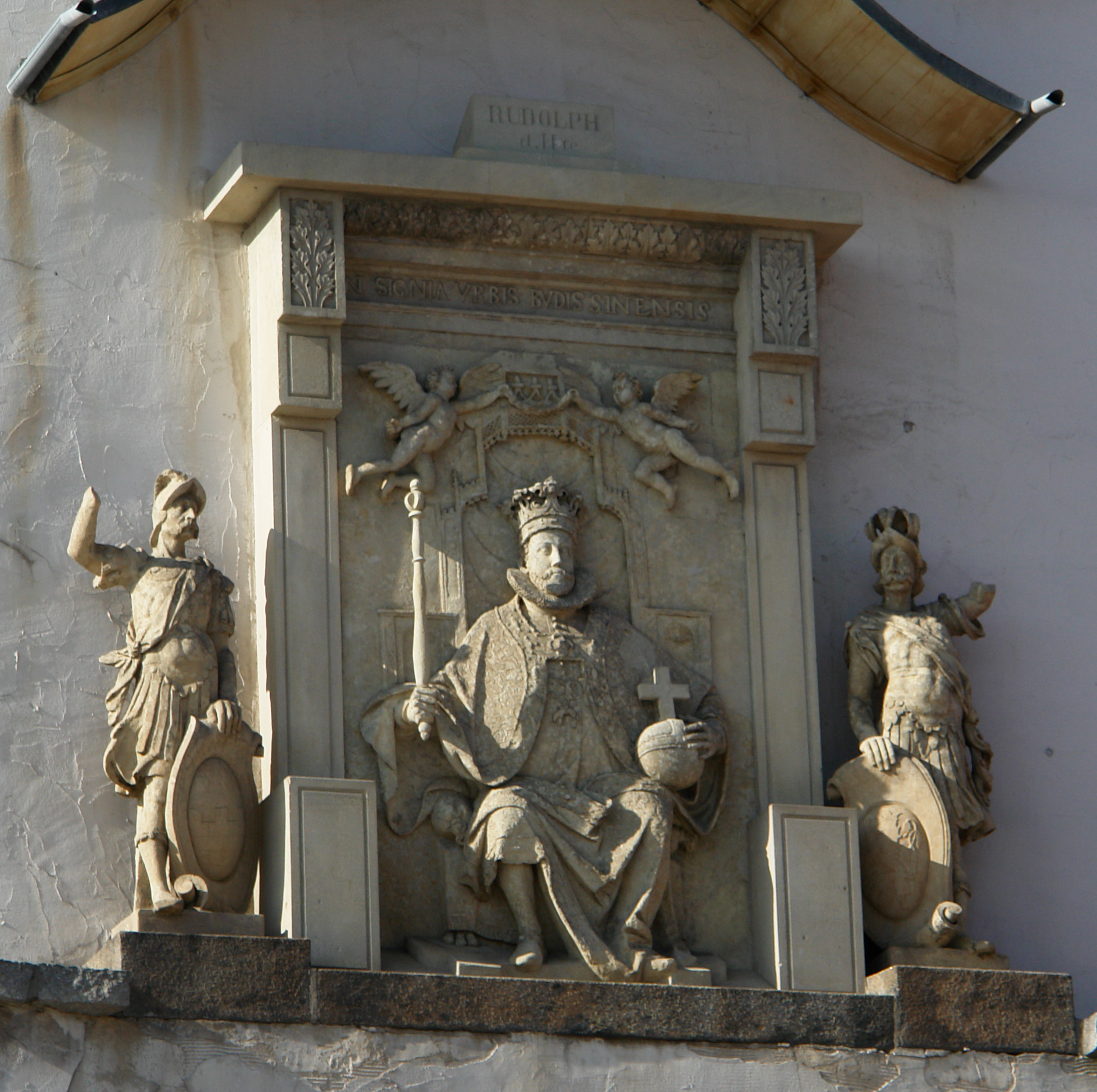 Reichenturm in Bautzen Bildnis des Kaisers Rudolf II. Hornjoserbsce: Relief kejžora Rudolfa při Bohatej wěži w Budyšinje.